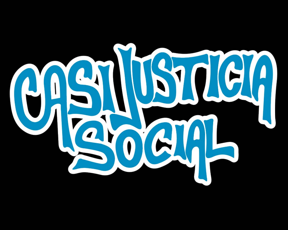 Logo de Casi Justicia Social(banda Argentina)